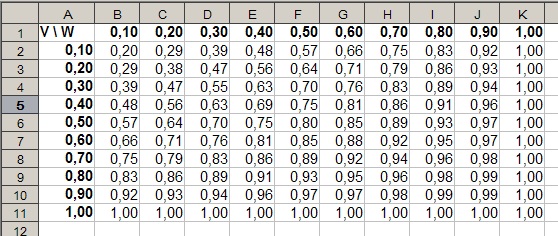 Vitesses relativistes Copie d'écran d'une session personnelle, mise par son auteur dans le domaine public.